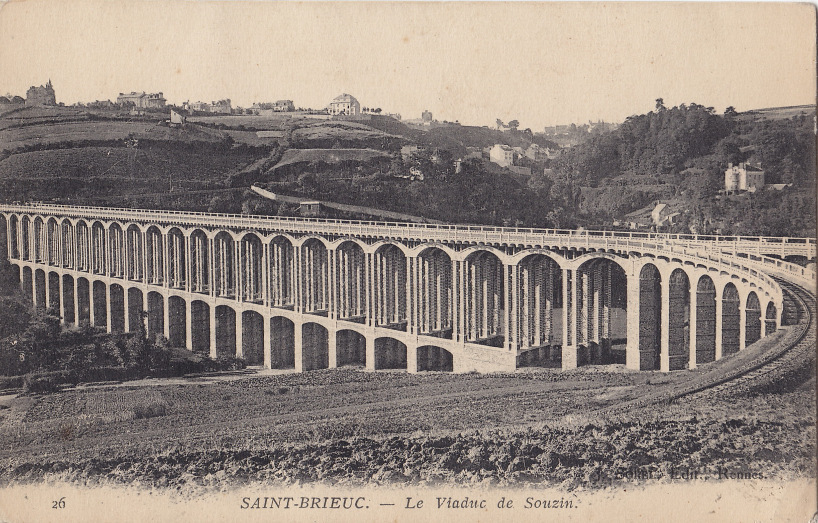 Carte postale ancienne éditée par Borel à Rennes :SAINT-BRIEUC - Le Viaduc de Souzin.